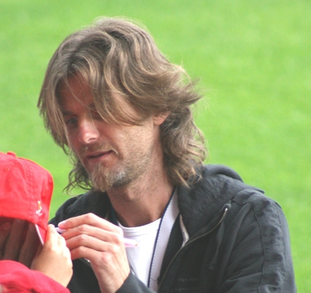 Alain Sutter im Trainingslager der Schweizer Fussballnationalmannschaft vor der Euro 2008